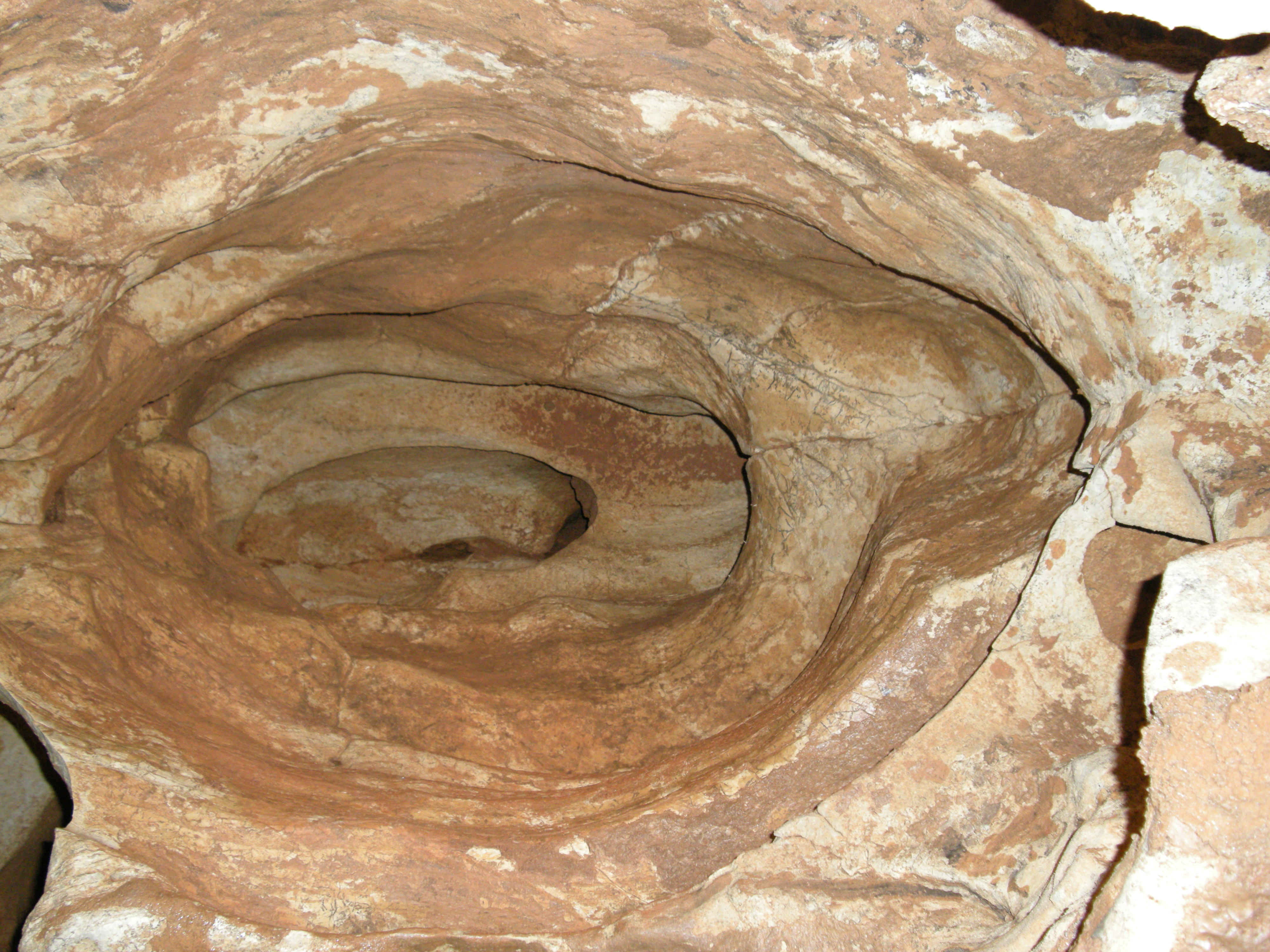 Boyau géologique - Grottes de Lacave dans le Lot (France). Prise de vue verticale : le plus grand diamètre est d'environ 1 mètre, la longueur visible d'environ 3 mètres.